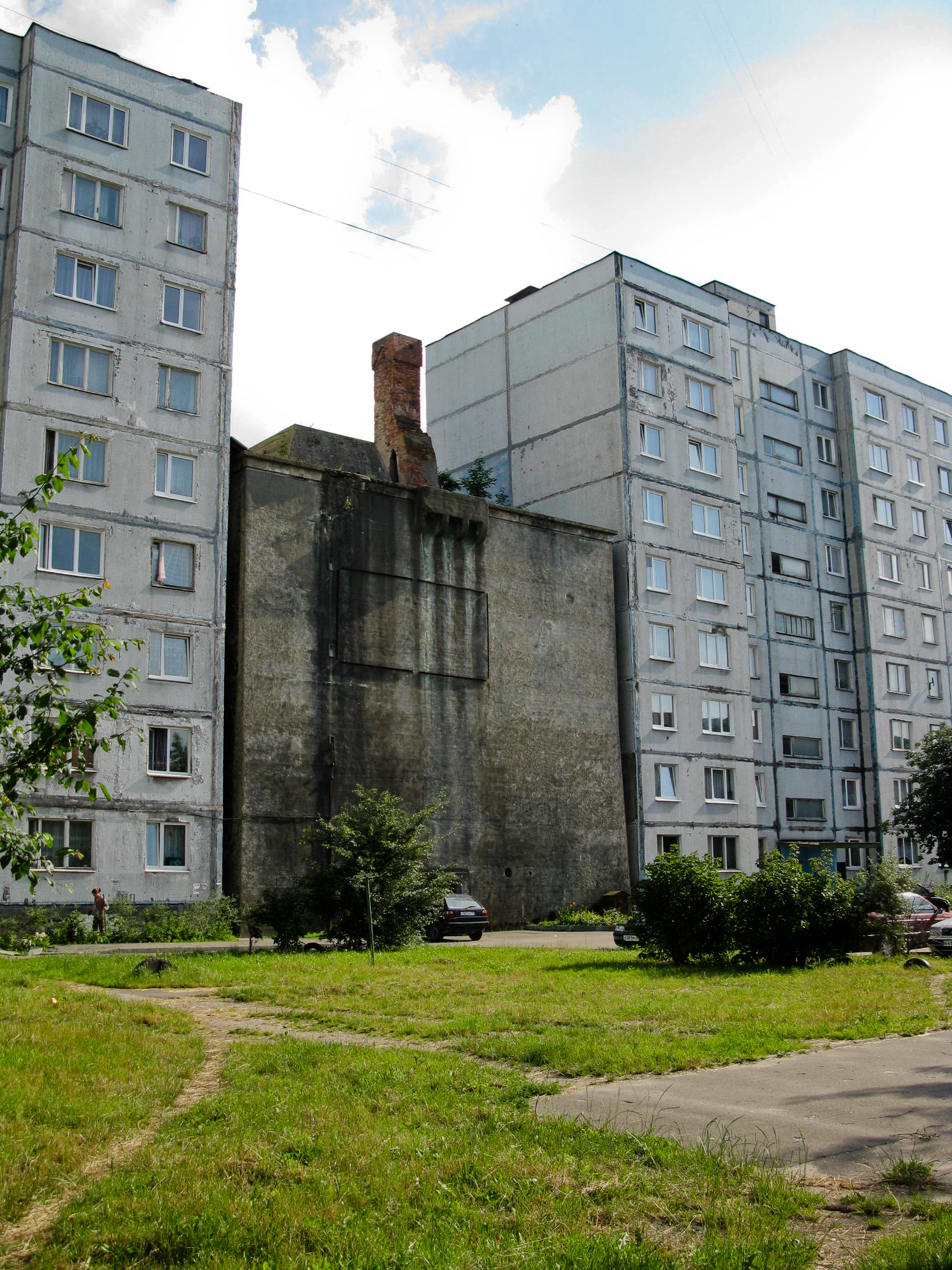 4-х уровневое дымо-газоубежище в Калининграде